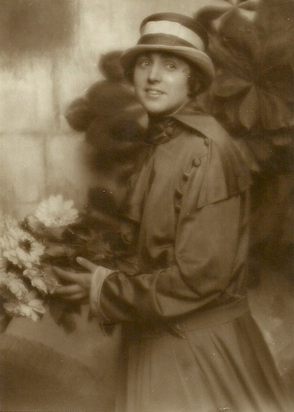 Schauspielerin Hella Moja auf einer Fotografie von Nicola Perscheid